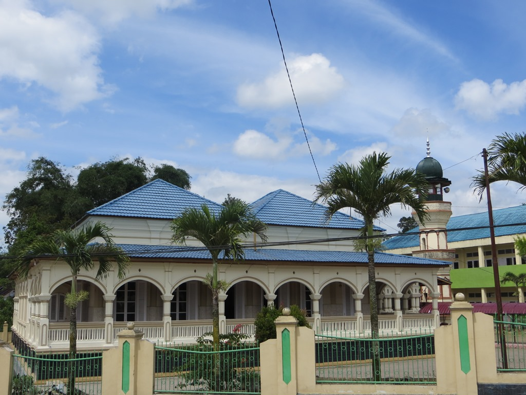 Masjid Kubang Agam